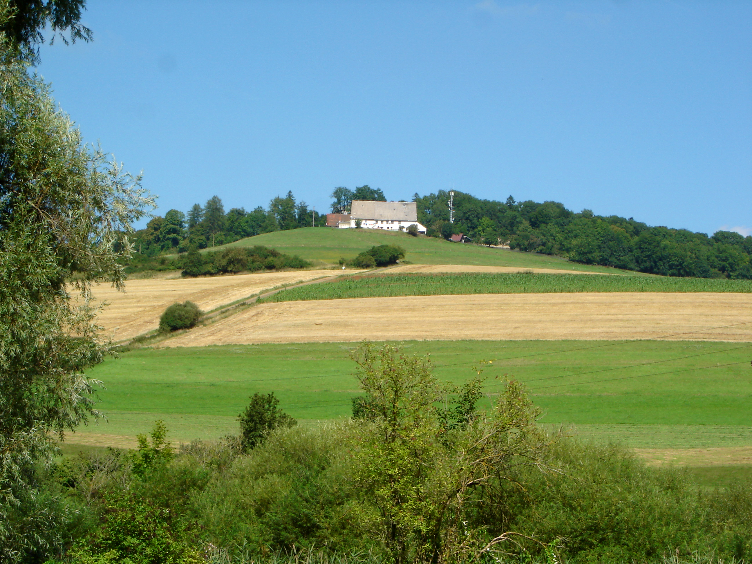 Deutschland: Wartenberg mit Gehöft von Gutmadingen aus gesehen